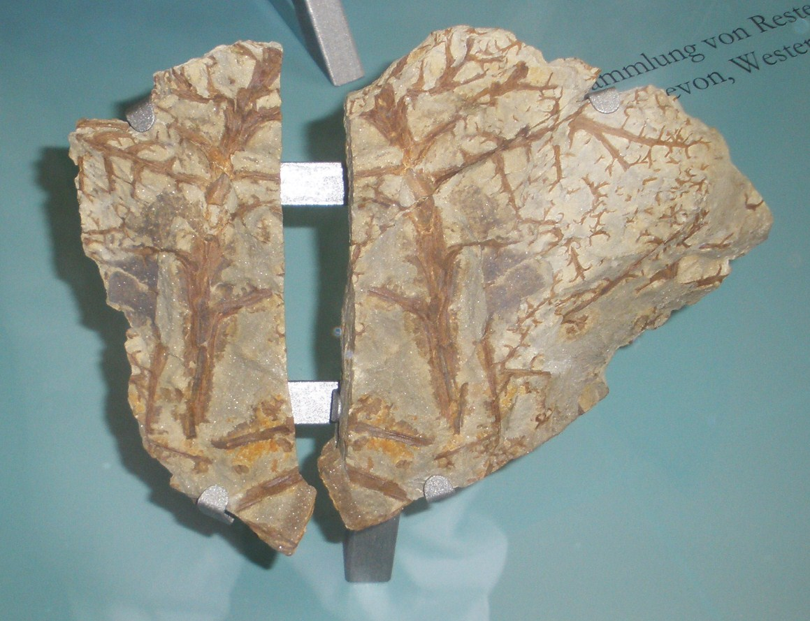 Fossil of Aneurophyton, an extinct plant- Took the photo at Senckenberg Museum of Frankfurt